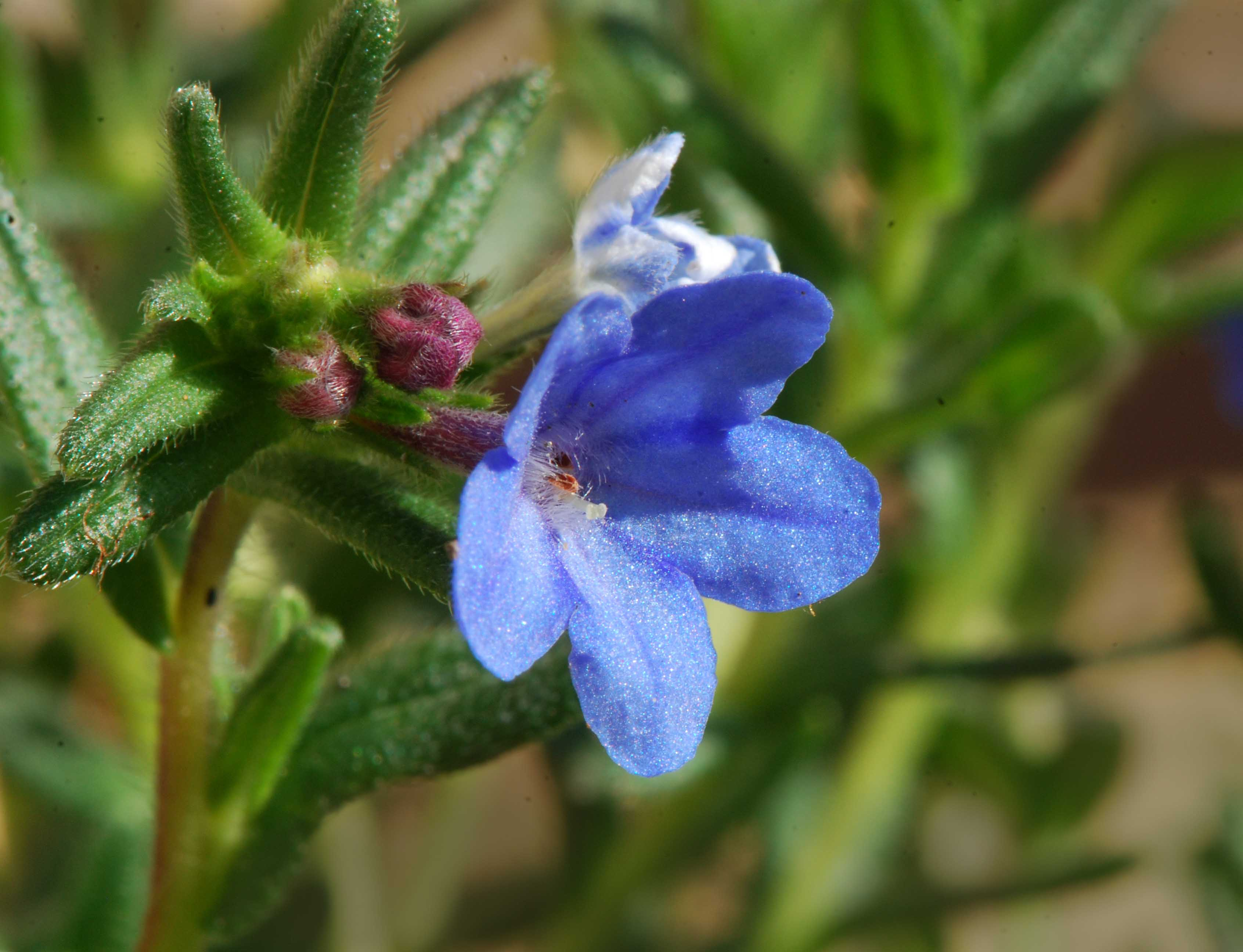 Lithodora prostata, fleur